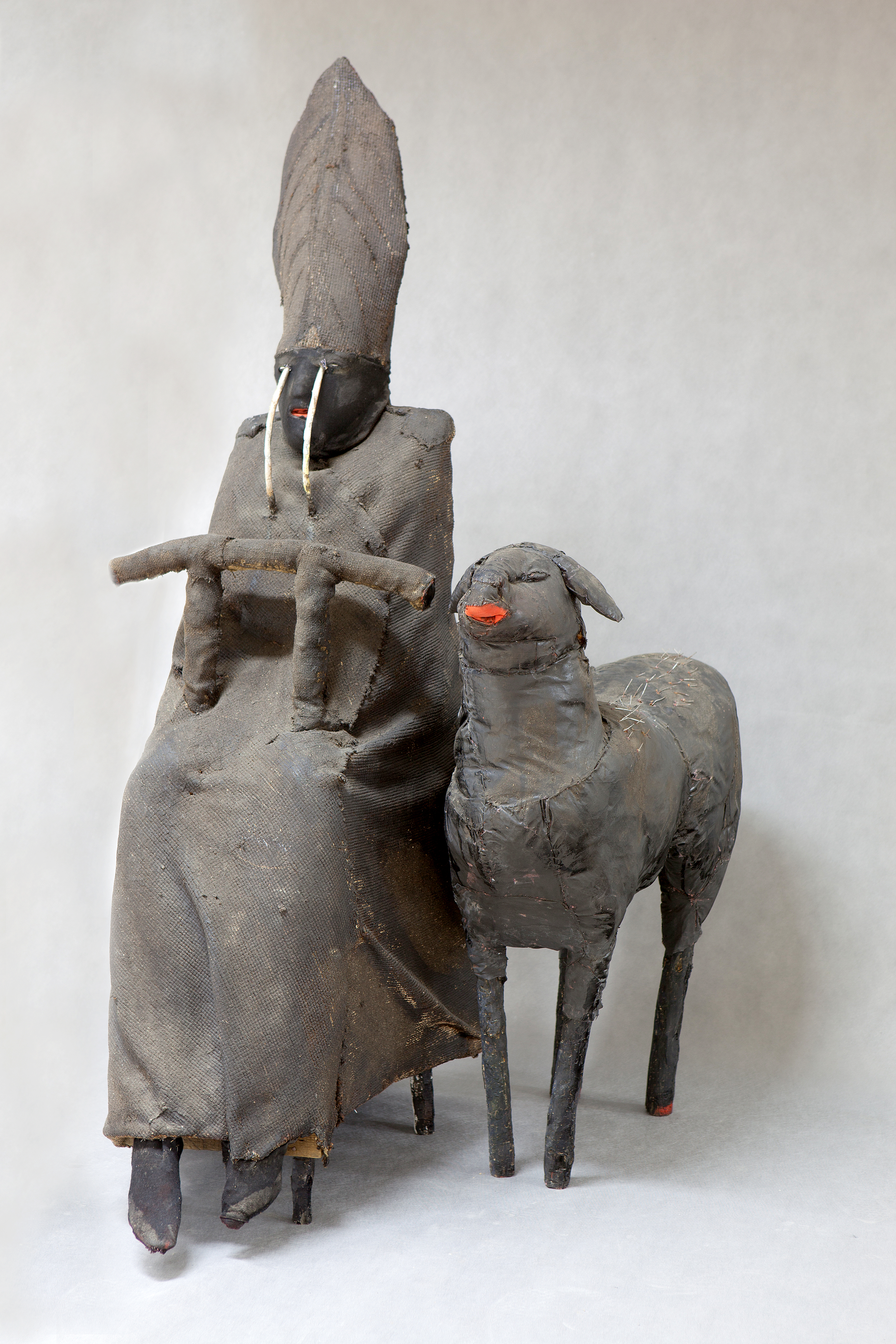 Czarny papież i czarna owca to jedno z najważniejszych wczesnych dzieł artysty. Naturalnych rozmiarów postaci człowieka-papieża towarzyszy owca. Papież płacze, z jego oczu symbolicznie tryskają strumienie wody. Artysta nawiązał w tym przedstawieniu do przepowiedni Nostradamusa, a także do miejskich legend, wizji i apokaliptycznych przepowiedni, łączących powołanie czarnoskórego kardynała na tron papieski z końcem świata. Praca oddaje stan ducha drugiej połowy lat 80.: niepokoju, napięć, ale i wiary w nadchodzący przełom, który wstrząśnie posadami świata. Rzeźba była prezentowana na ostatnim Biennale w Wenecji w 2013 w głównej sekcji zatytułowanej Pałac Encyklopedyczny.